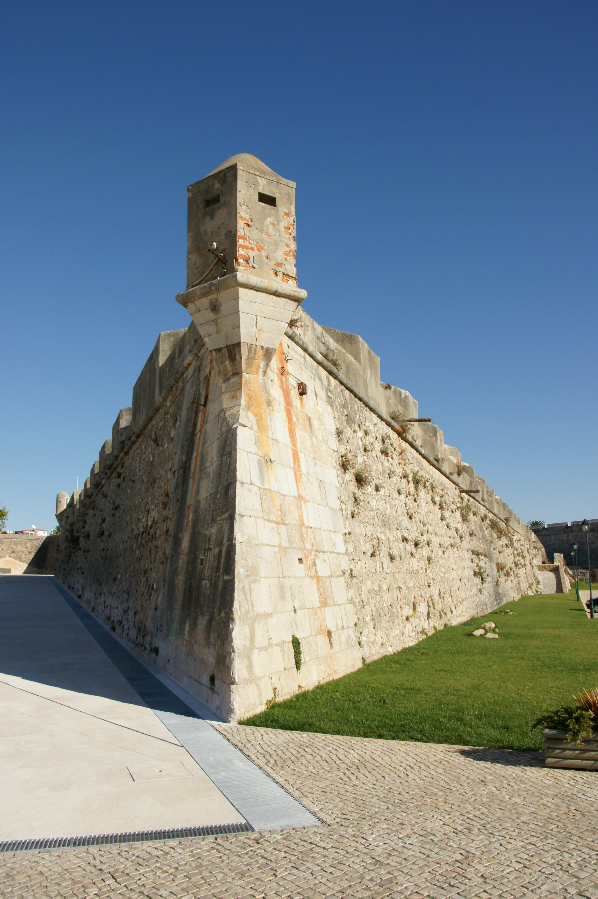 Cidadela de Cascais, freguesia de Cascais, distrito de Lisboa, Portugal: baluarte com guarita.